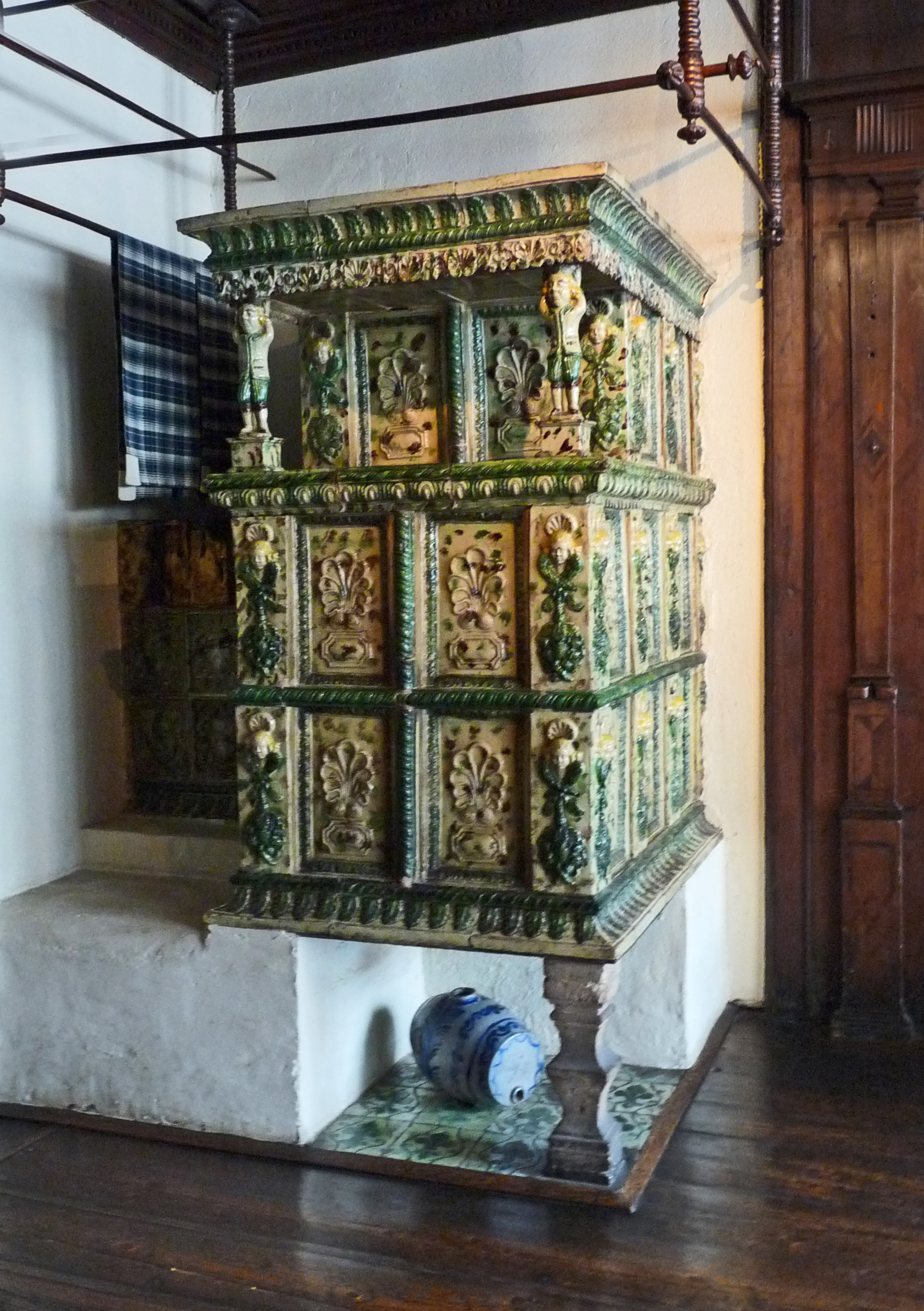 Poêle en faïence (Kachelofe). Logelheim (Haut-Rhin), 17e siècle. Siège latéral rajouté au 18e siècle. Séchoir en bois tourné. Musée alsacien de Strasbourg.